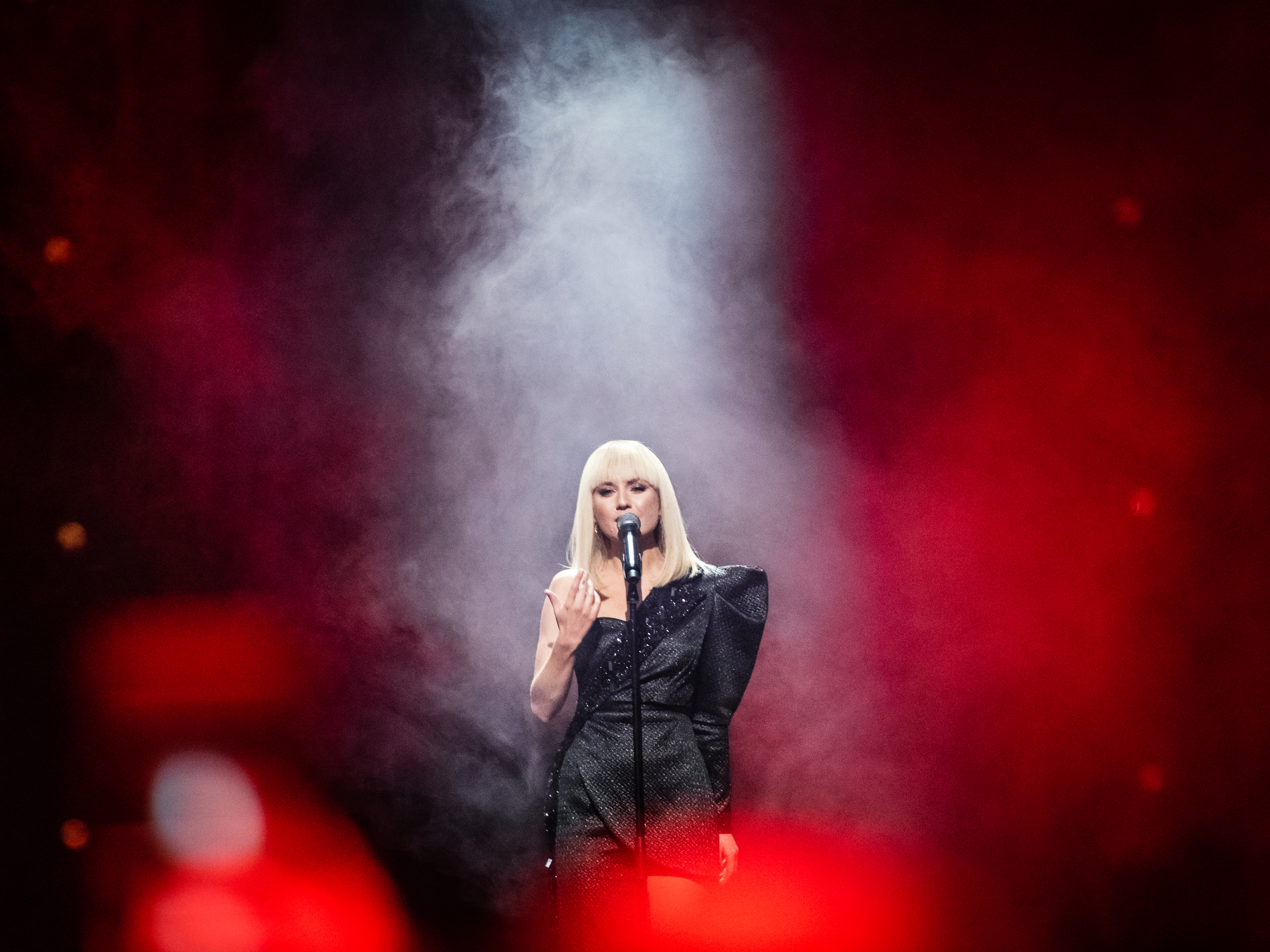 Anna Bergendahl på scen i finalen till Melodifestivalen 2020 på Friends Arena.